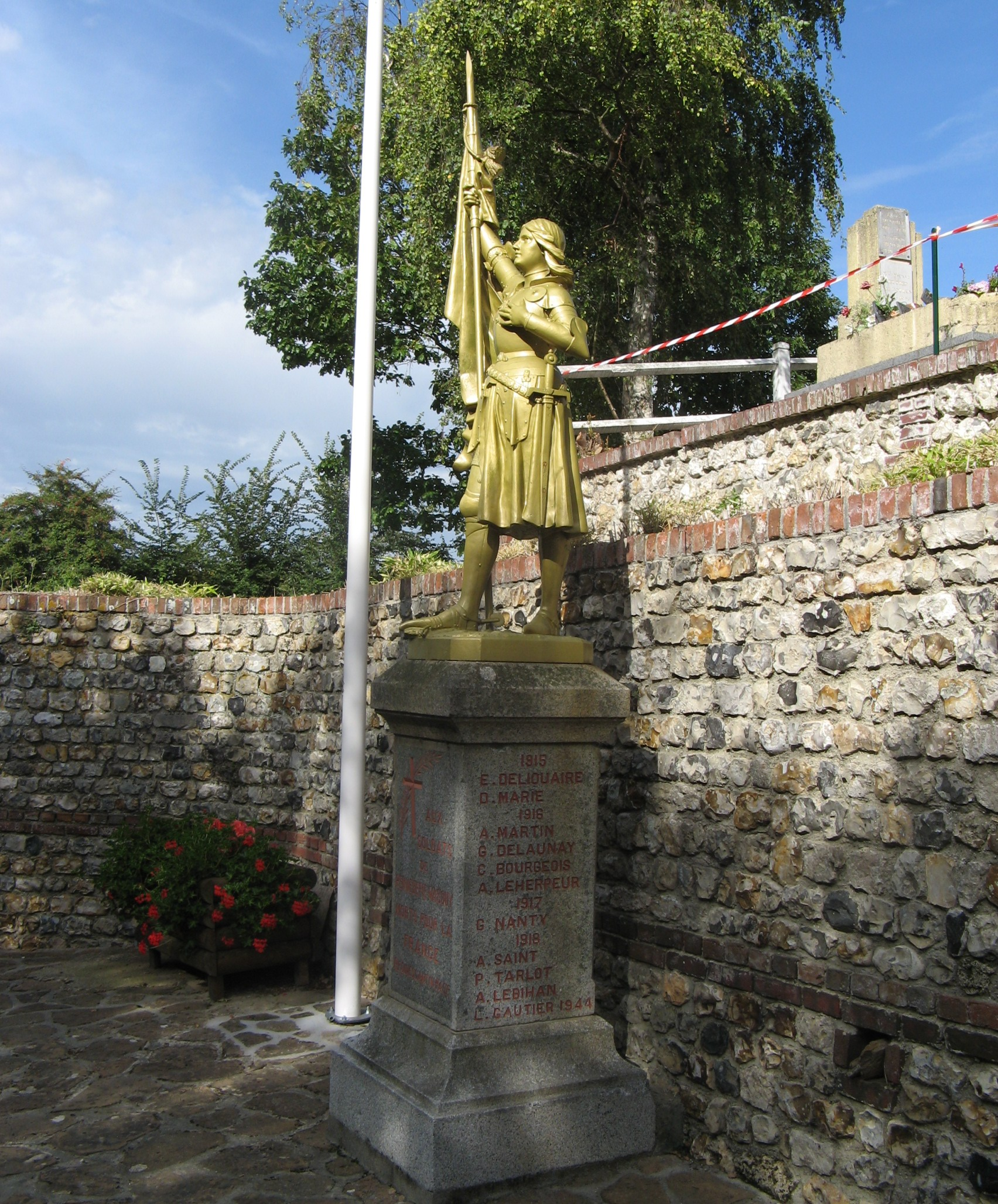 Monument aux morts surmontée d'une statue en fonte de Jeanne d'Arc (1897), sculpteur Adolphe Roberton (Français, ?-1899), fonderie A. Durenne, à Pennedepie, Calvados, France. [1]